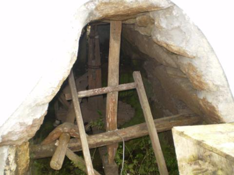 O Muíño de Muiñeiro en Xove.